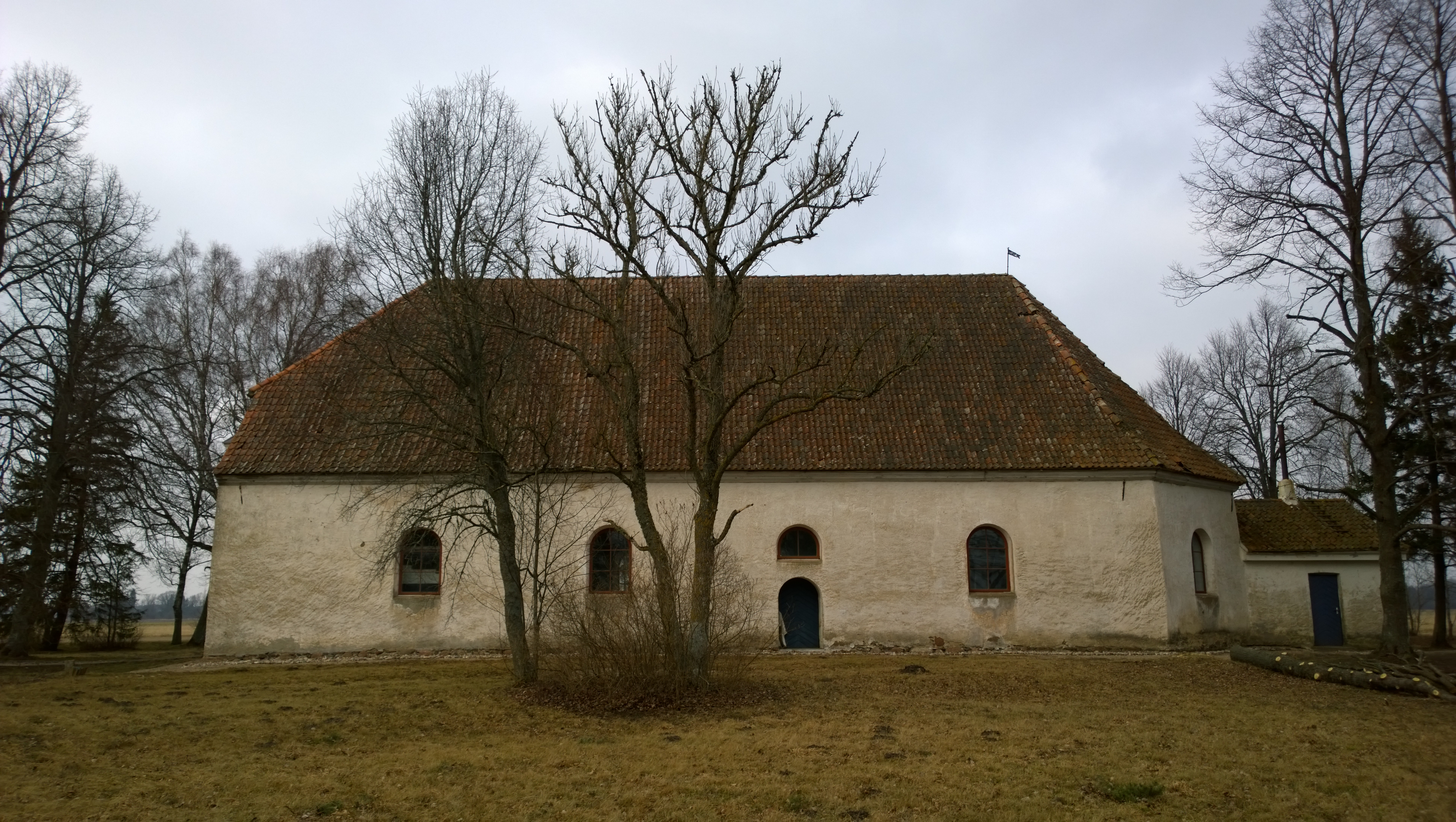 Užavas luterāņu baznīca, Užava